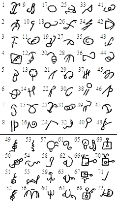 Ideogramas creados en los años 1927-1928 por el pastor de renos chucoto Tenevil